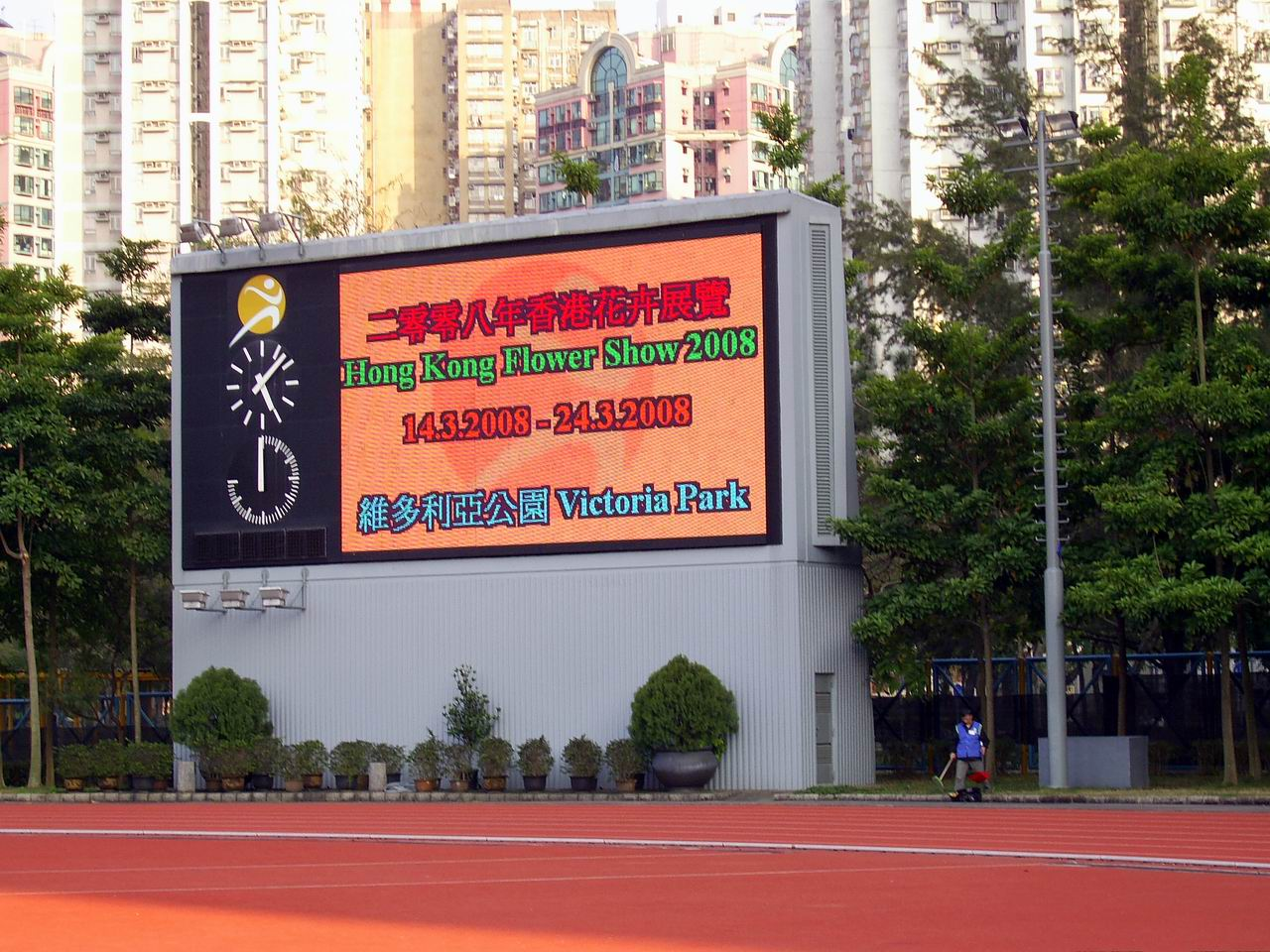 大埔運動場電子屏幕